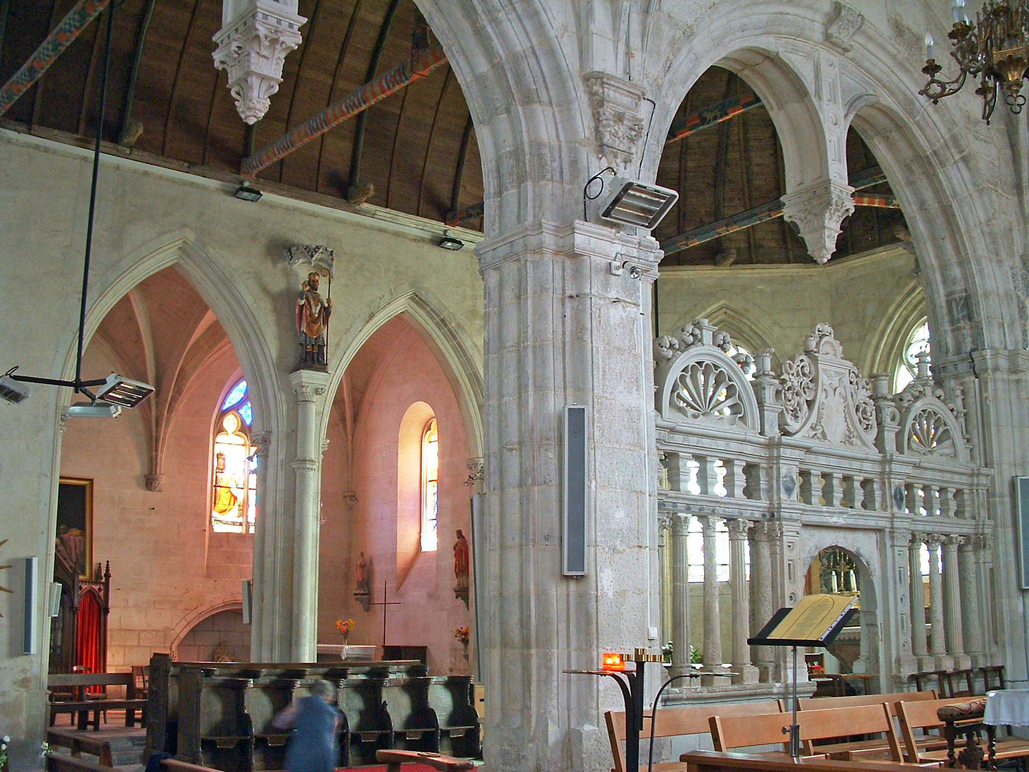 Mézières-en-Brenne - Église Sainte-Marie-Madeleine - La chapelle nord vue de la chapelle d'Anjou